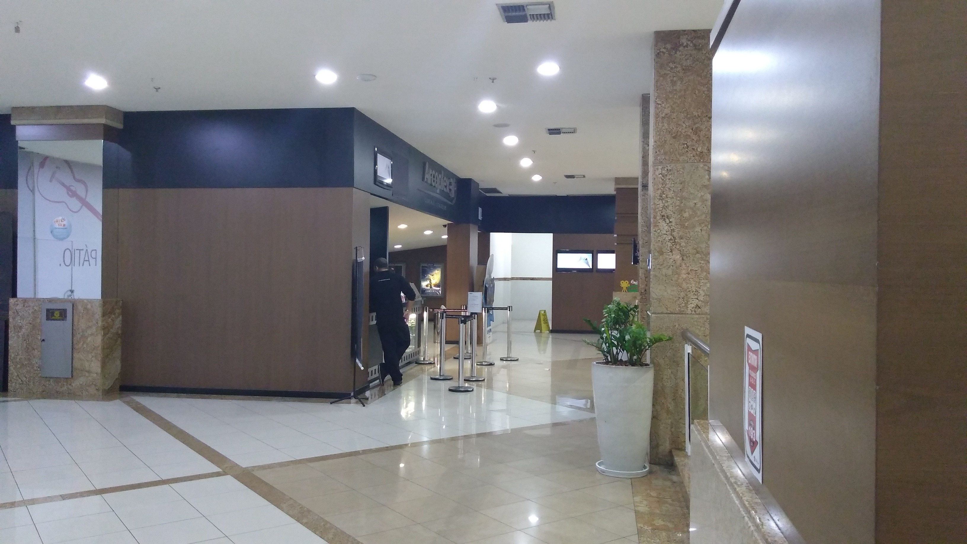 Vista do corredor do Arcoplex Patio Dom Luis